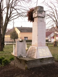 Második világháborús emlékmű, Felsőnyék